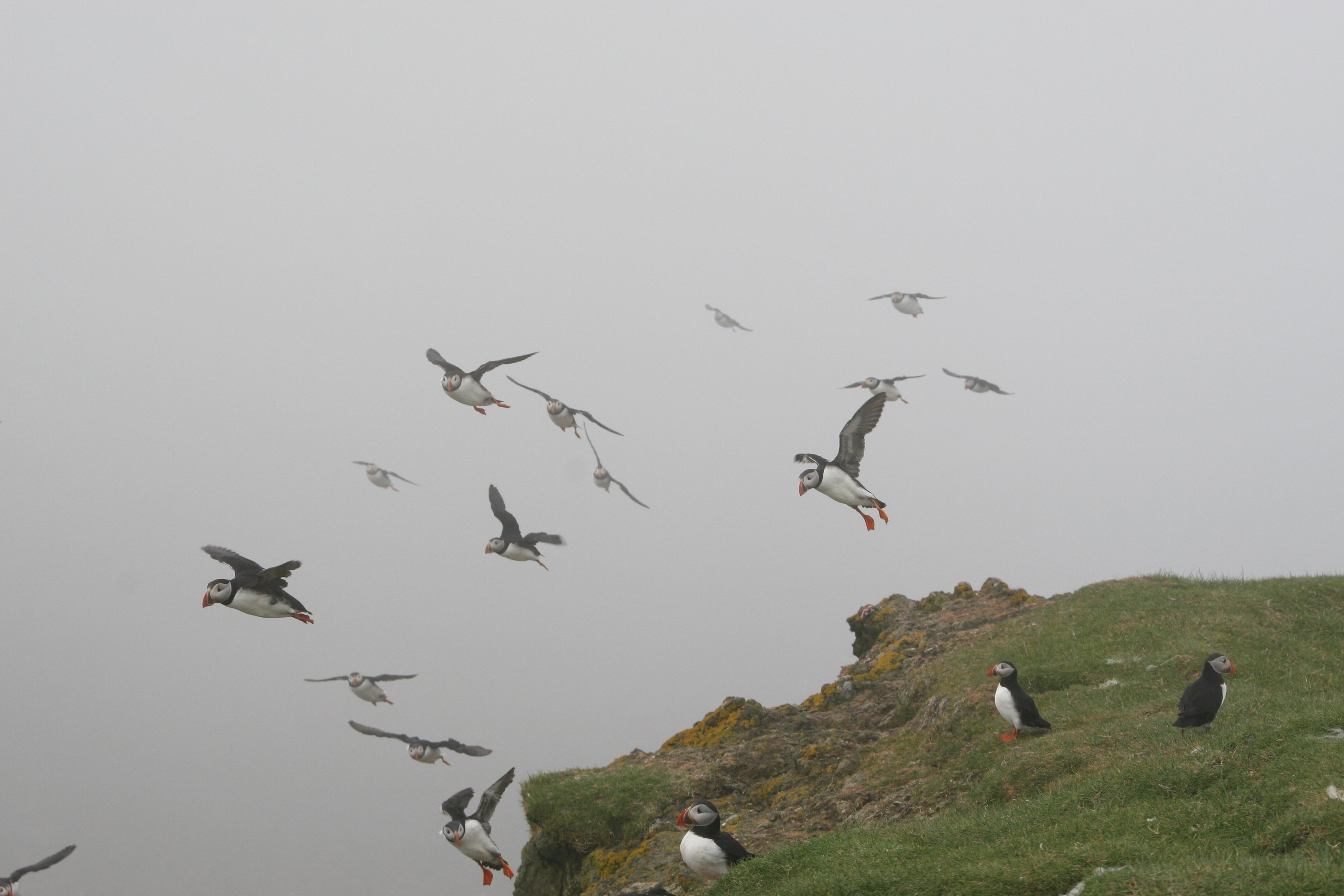 Papageitaucher (Fratercula arctica) im Anflug über den Klippen von Mykines, Färöer